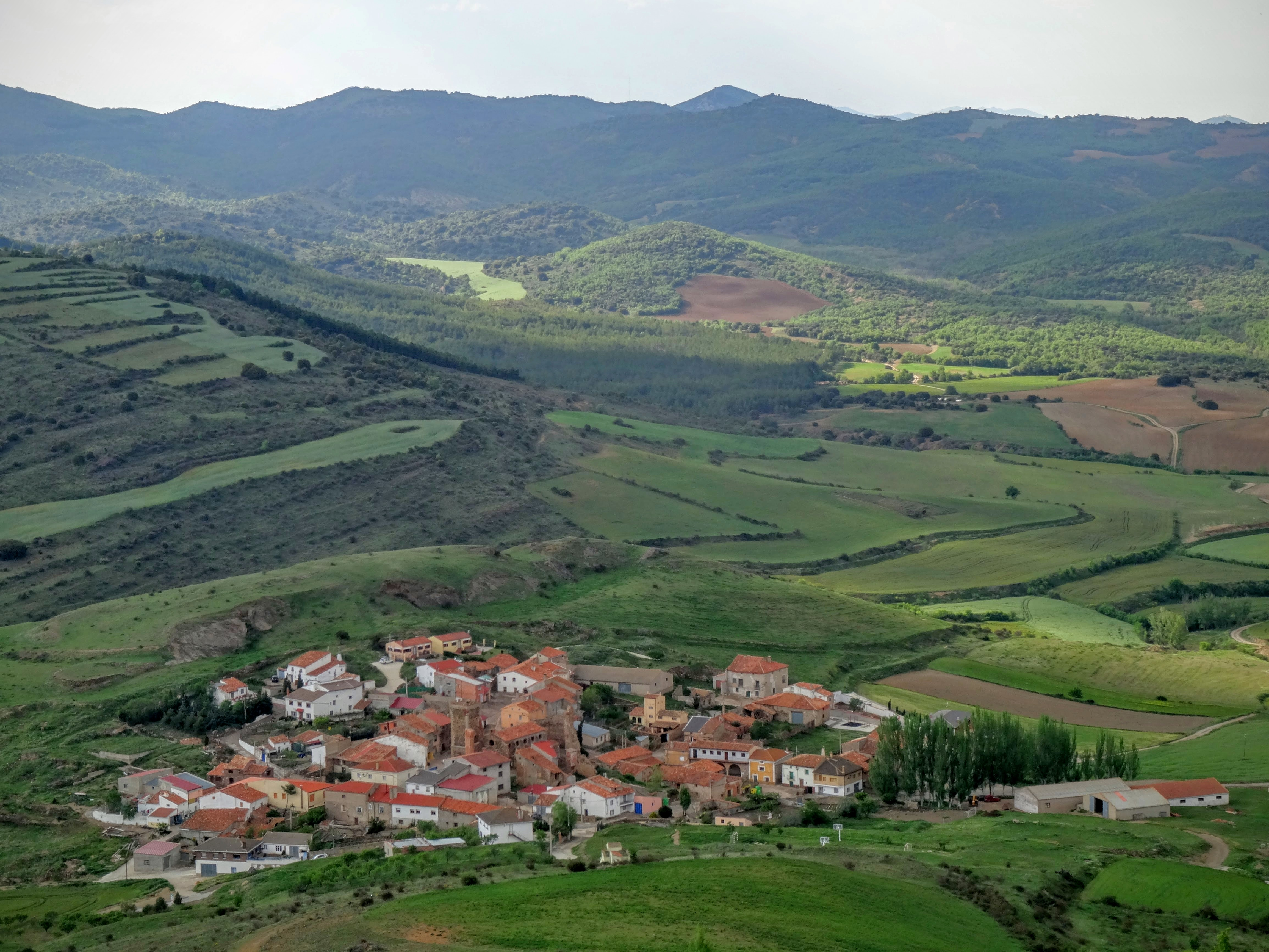 Bádenas desde el monte La Modorra